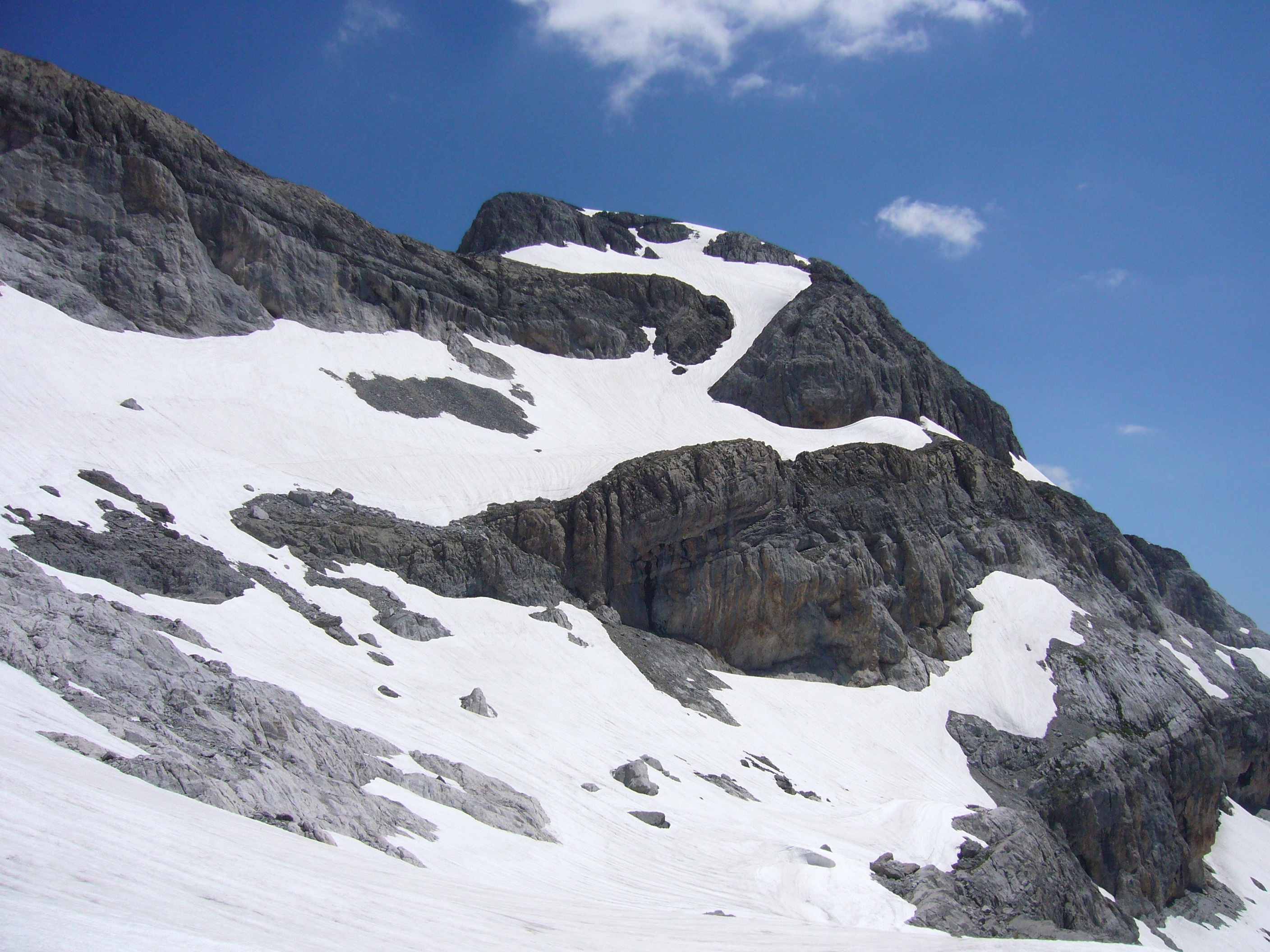 Tour du Marboré face sud prise le 19/07/2008